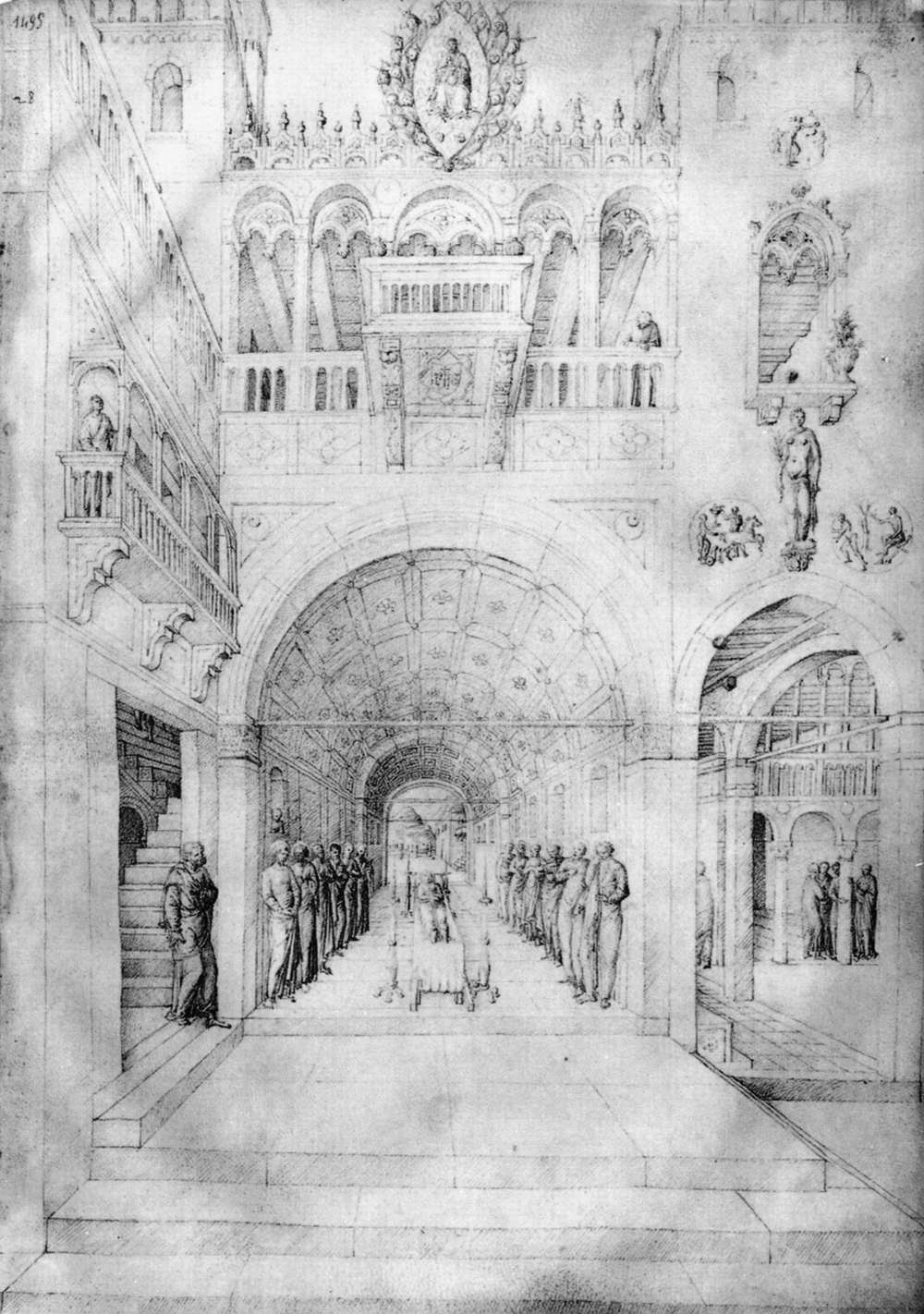 BELLINI, Jacopo Dormition of the Virgin Leadpoint on parchment, 425 x 285 mm Musée du Louvre, Paris